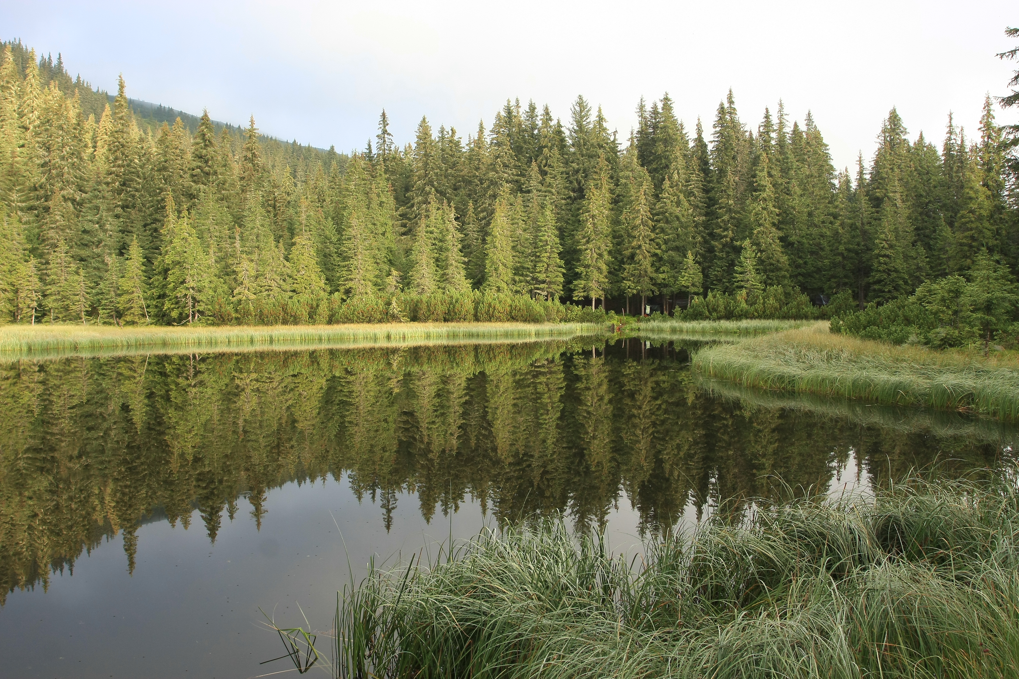 Карпатський, Яремчанська міська рада, Верховинський район, Надвірнянський район